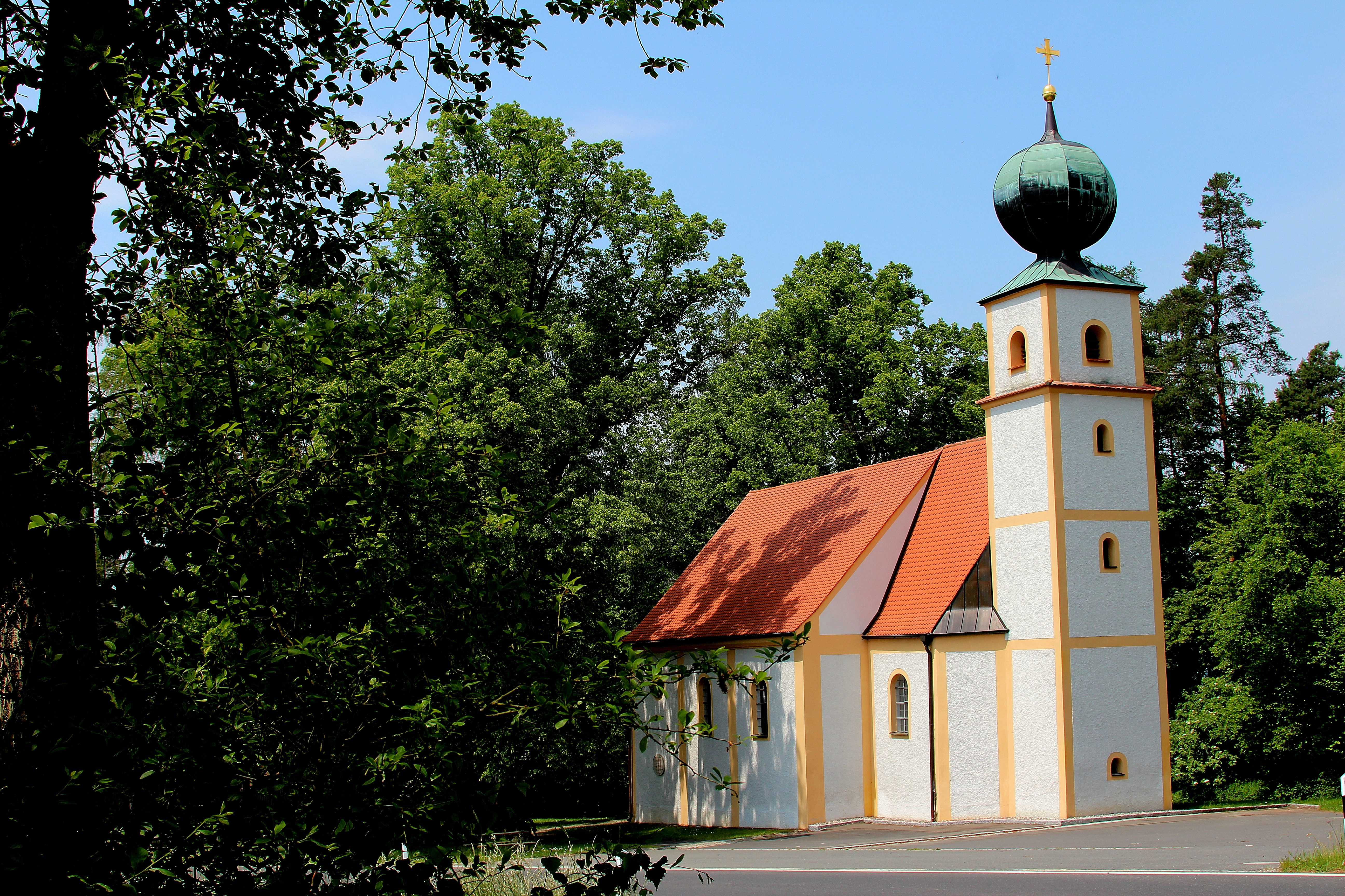 St. Nikolaus in Luhe, Luhe-Wildenau, Landkreis Neustadt an der Waldnaab, Oberpfalz, Bayern